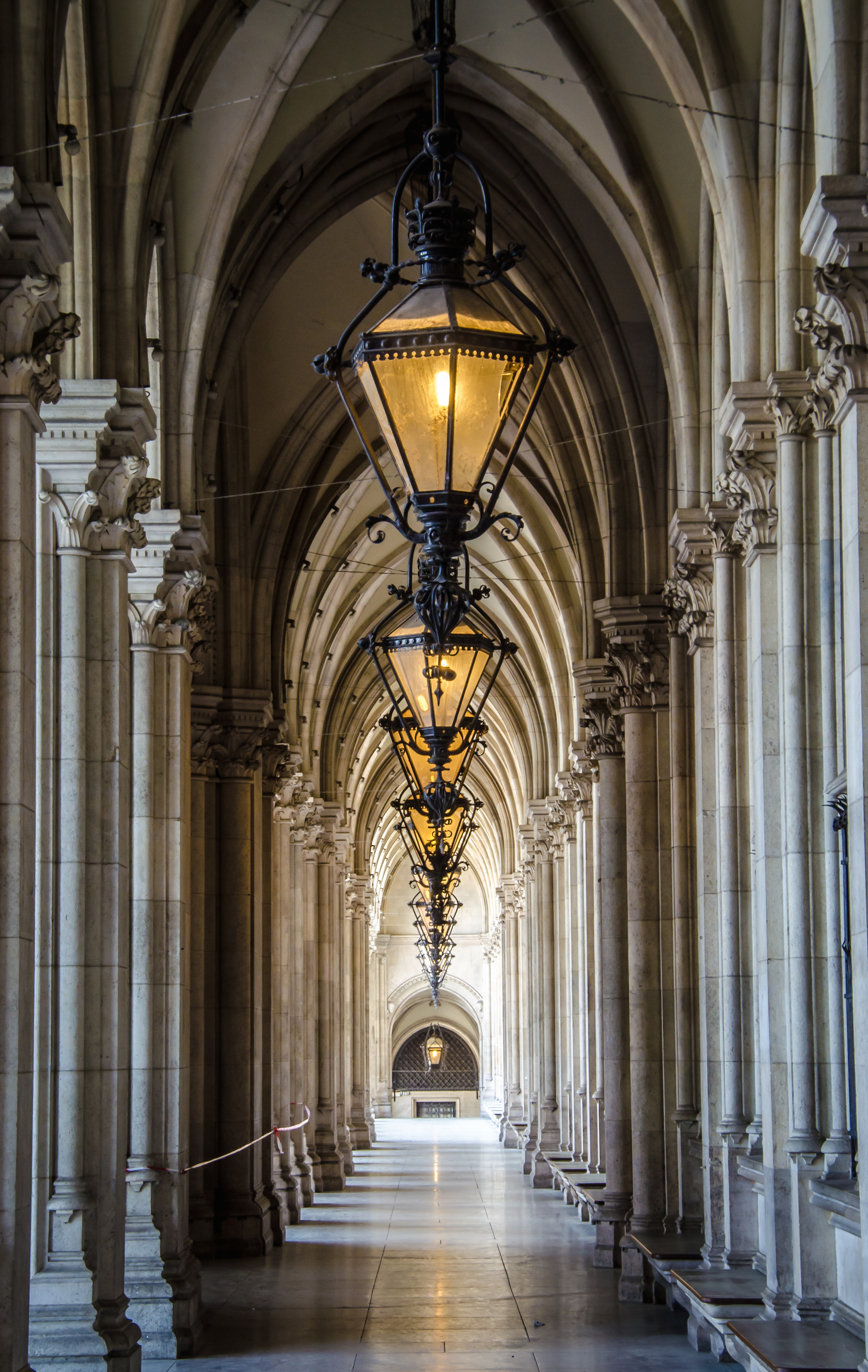 Rathaus